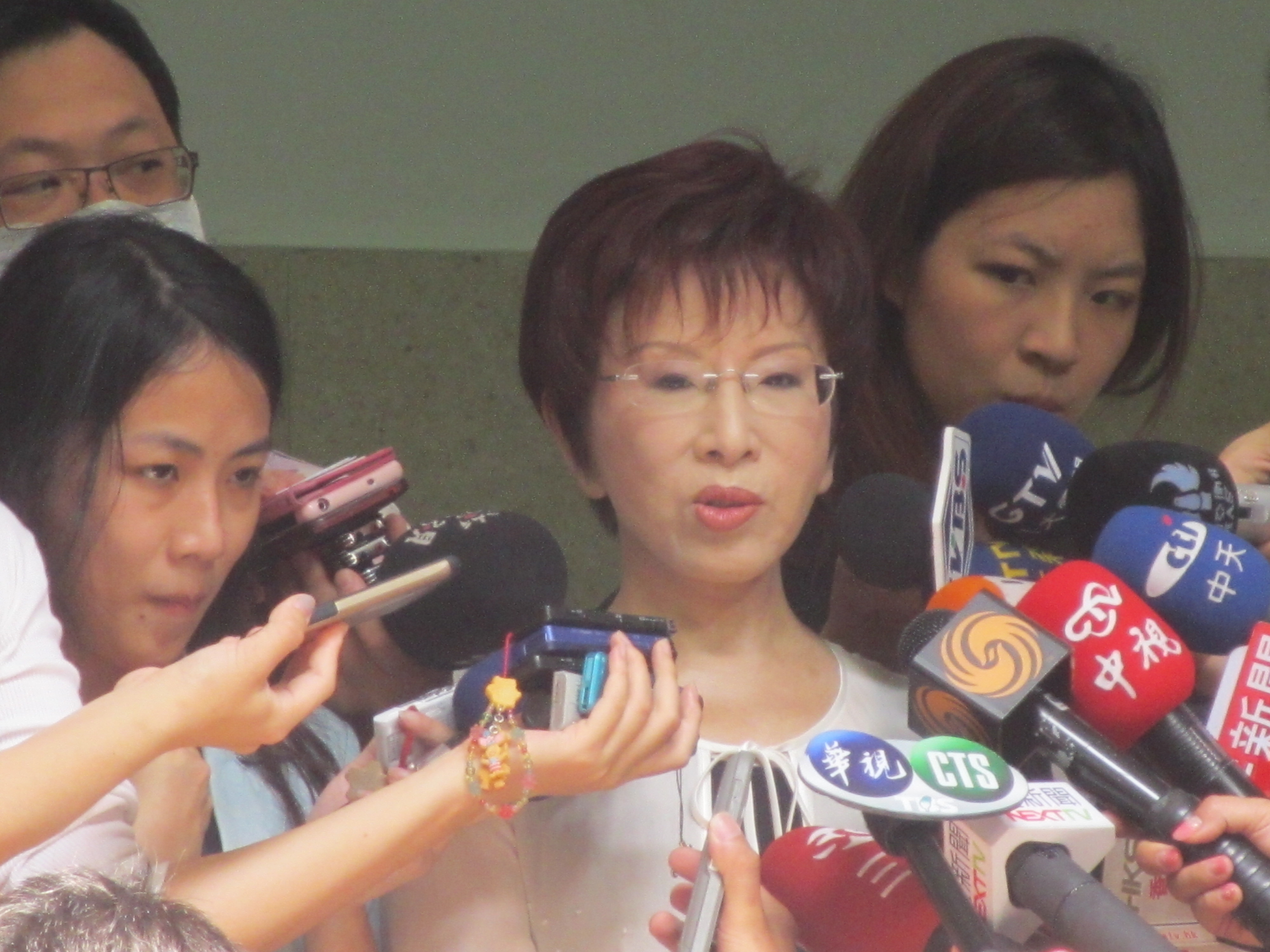 中文（台灣）: 台灣立法院副院長洪秀柱接受媒體採訪(美國之音張永泰)